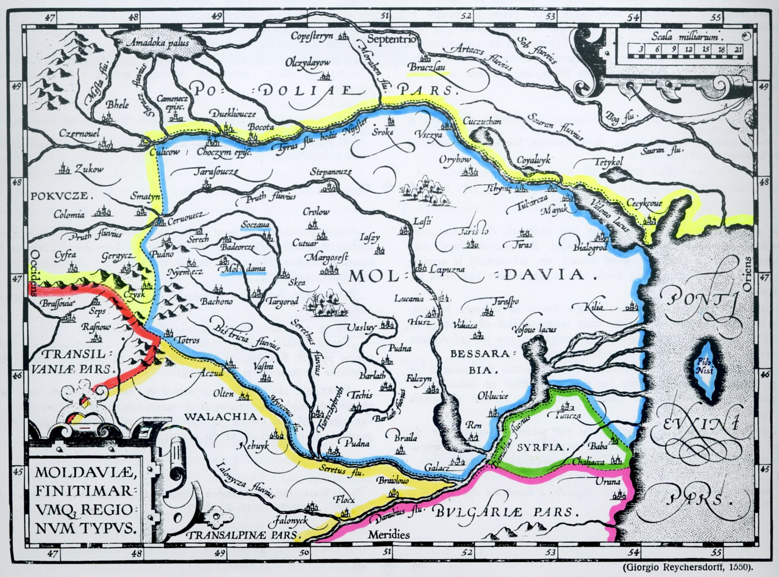 Carte médievale de la Moldavie